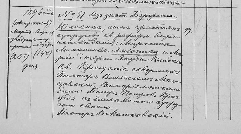 Juliaus Janonio gimimo ir krikšto įrašo Biržų evangelikų-reformatų bažnyčios krikštų knygoje kopija.2017